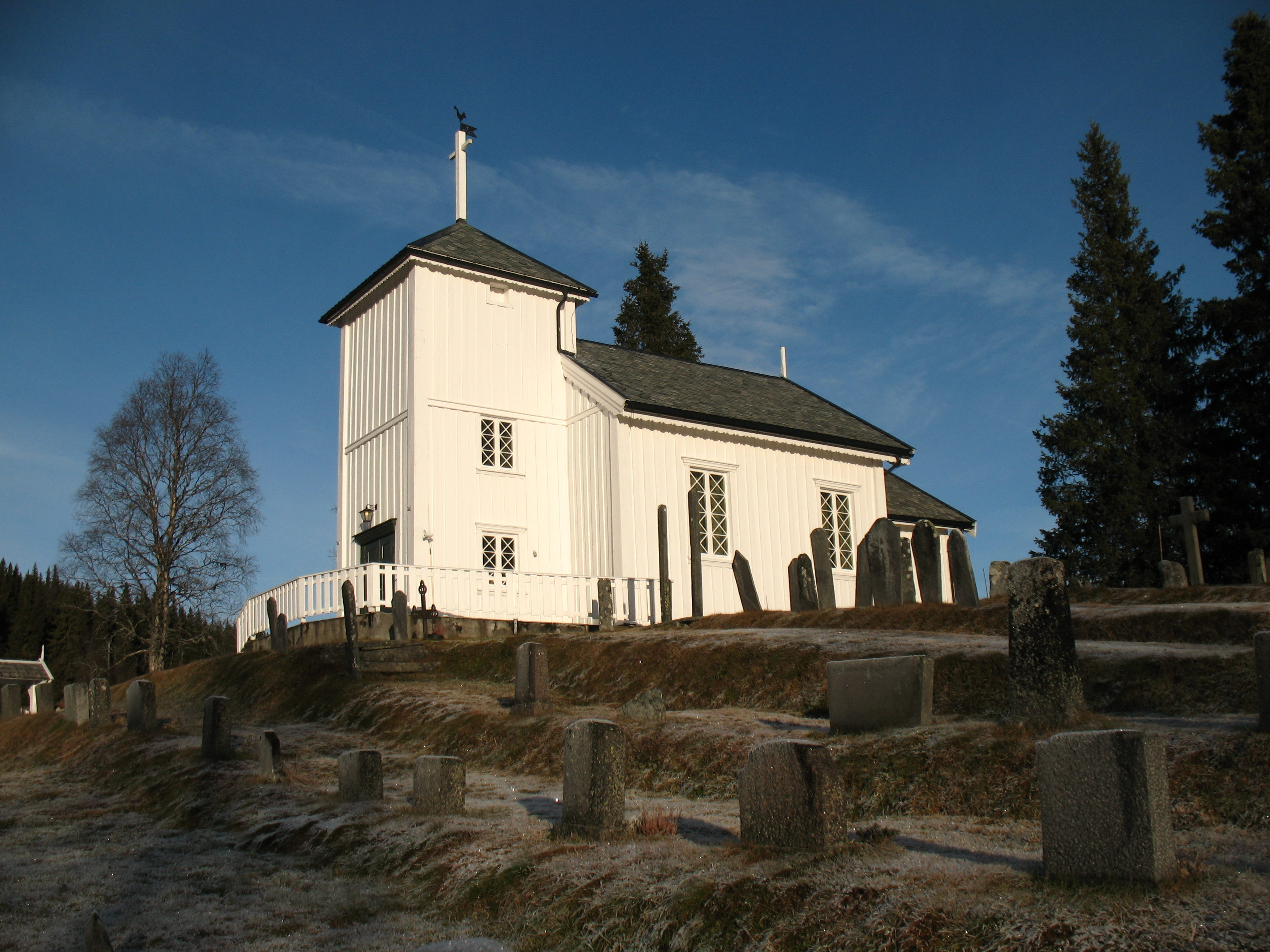 Øyfjell kyrkje er ei langkyrkje i tre frå 1833 som står i Vinje kommune i Telemark, Agder og Telemark bispedømme; Vest-Telemark prosti. Sett frå sør.